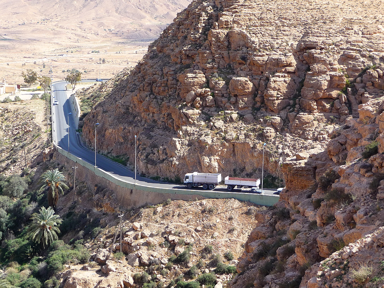 Nalut,mountain